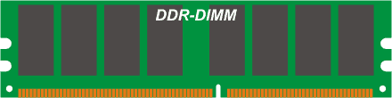 DDR-DIMM-Ram Modul M1:1